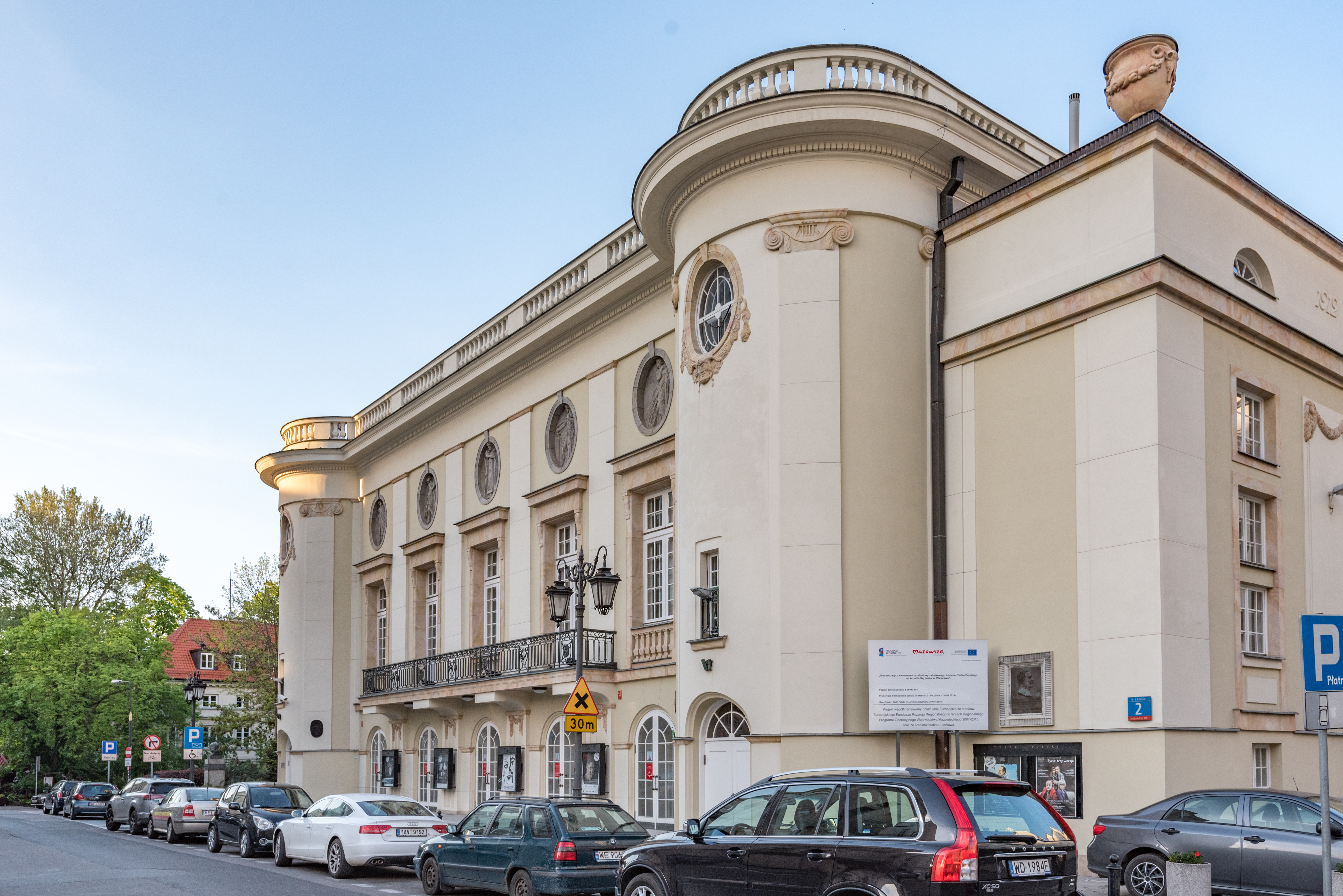 Warszawa, ul. Karasia 2